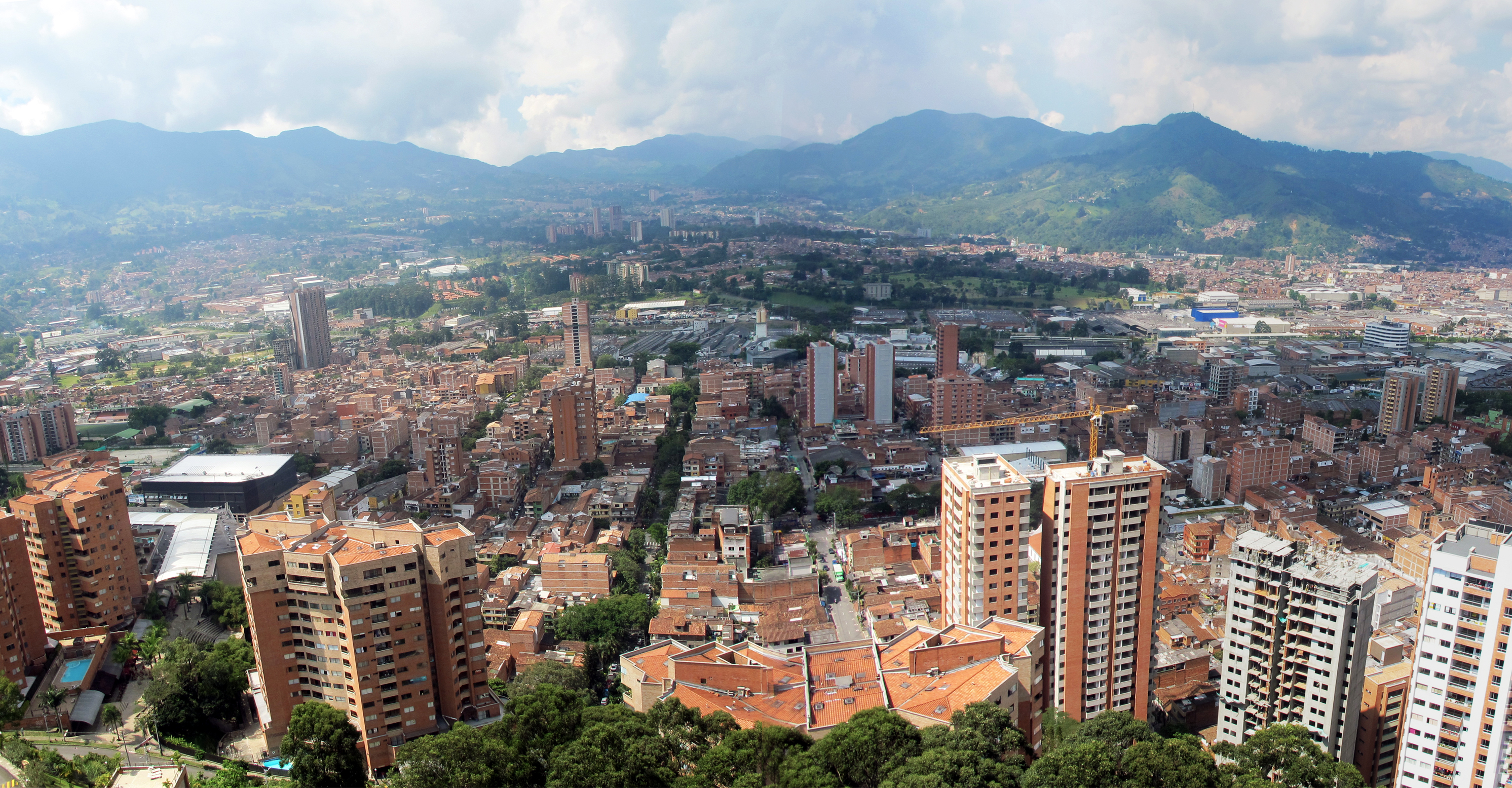 Panorámica del área urbana de Sabaneta.